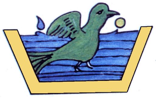 Escudo del municipio de Huitzilac, Morelos.